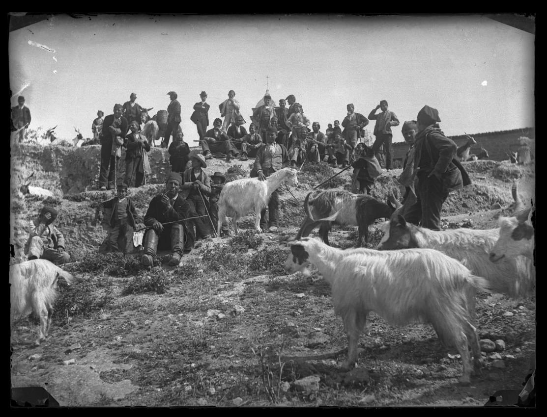 Groupe de paysans italiens avec des chèvres dans un terrain raviné, vus en contre-plongée, un clocher en arrière plan, en Sicile, à Taormine?, vers 1893 ou 1895. Technique : Négatif au gélatino-bromure d'argent Support : Plaque de verre Taille : 9x12cm